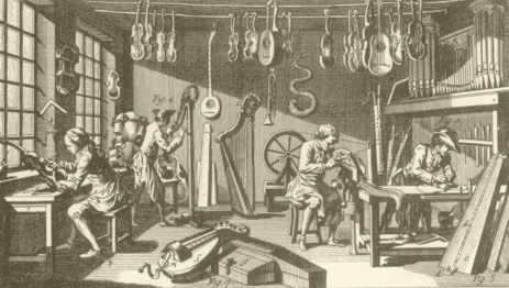 Luthiers